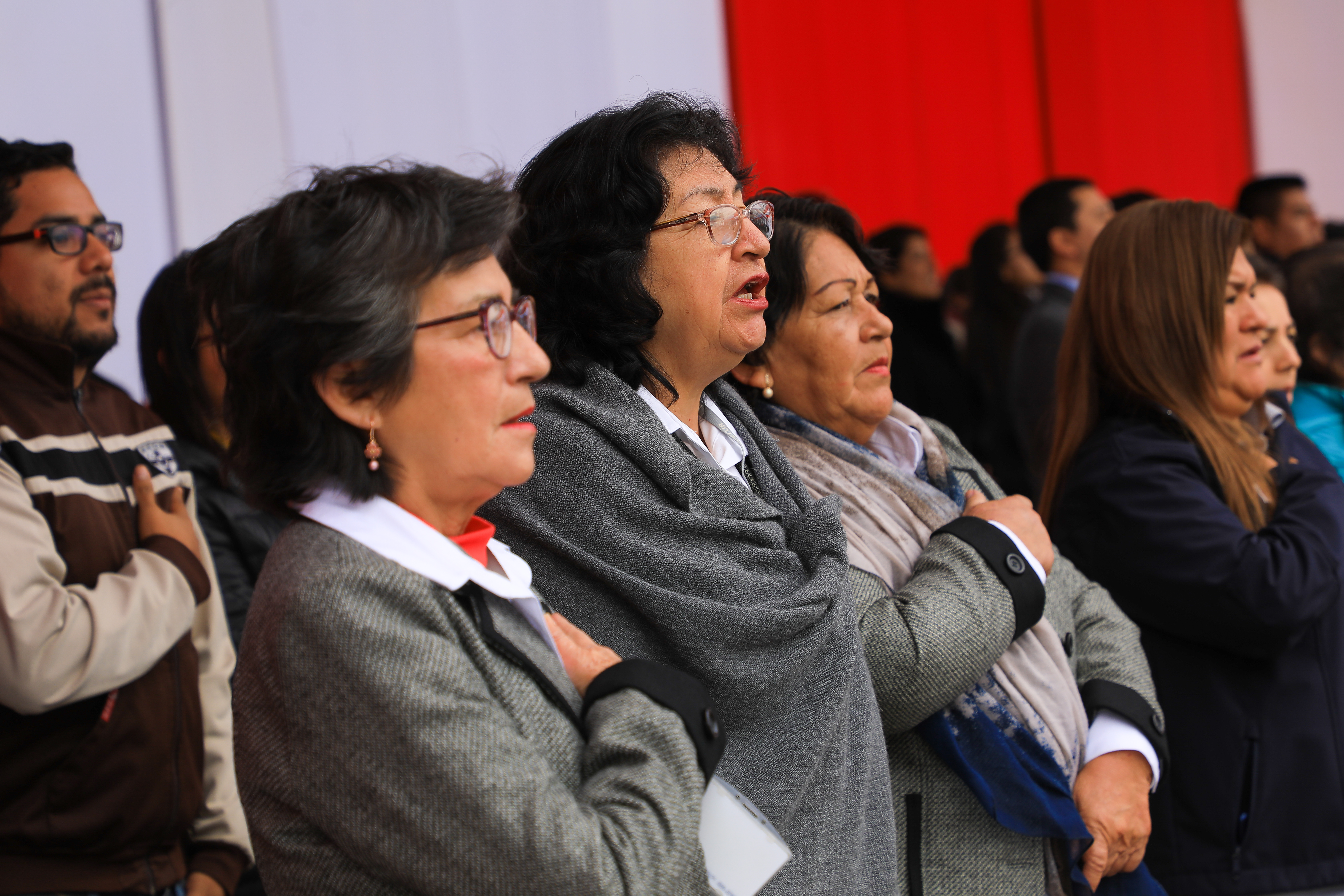 Fiestas Patrias en Peru